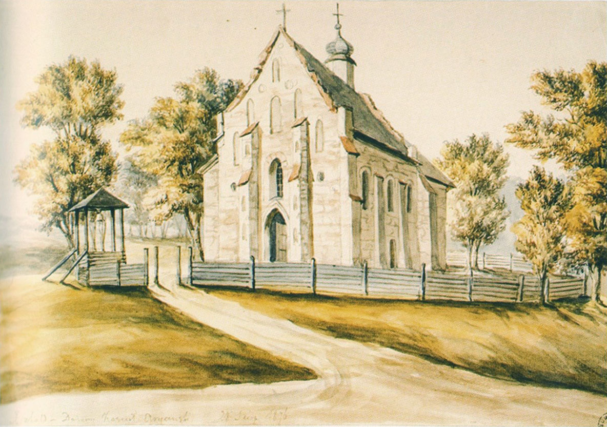 Беларуская (тарашкевіца): Ішкальдзь (Iškaldź). Касьцёл Найсьвяцейшай Тройцы